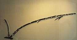 „Pflug von Walle“. Ältester Pflug in Europa – Kopie im Historischen Museum Aurich.